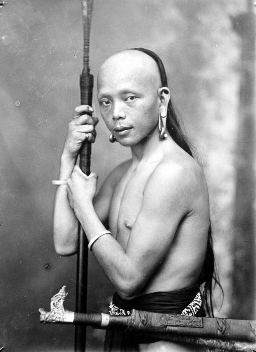 Repronegatief. Dajaks hadden bij het koloniaal gouvernement en bij de Europeanen een slechte reputatie vanwege het koppensnellen. In de eerste helft van de 19e eeuw probeerde het Gouvernement in Borneo's Zuider- en Oosterafdeling daar een eind aan te maken. Dat lukte redelijk. Het koppensnellen van de Dajaks wil echter nog niet zeggen dat het allemaal jagers en verzamelaars waren. In feite waren de meeste Dajaks in de 19e eeuw landbouwers, zij het dat ze vooral 'zwerflandbouw' bedreven. Wel verzamelden ze daarnaast bosproducten en werd er weleens gejaagd. Daarbij werden dan kapmessen, speren en blaasroeren gebruikt. (P. Boomgaard, 2001). Een Dajak met oorhangers en een lans, Borneo